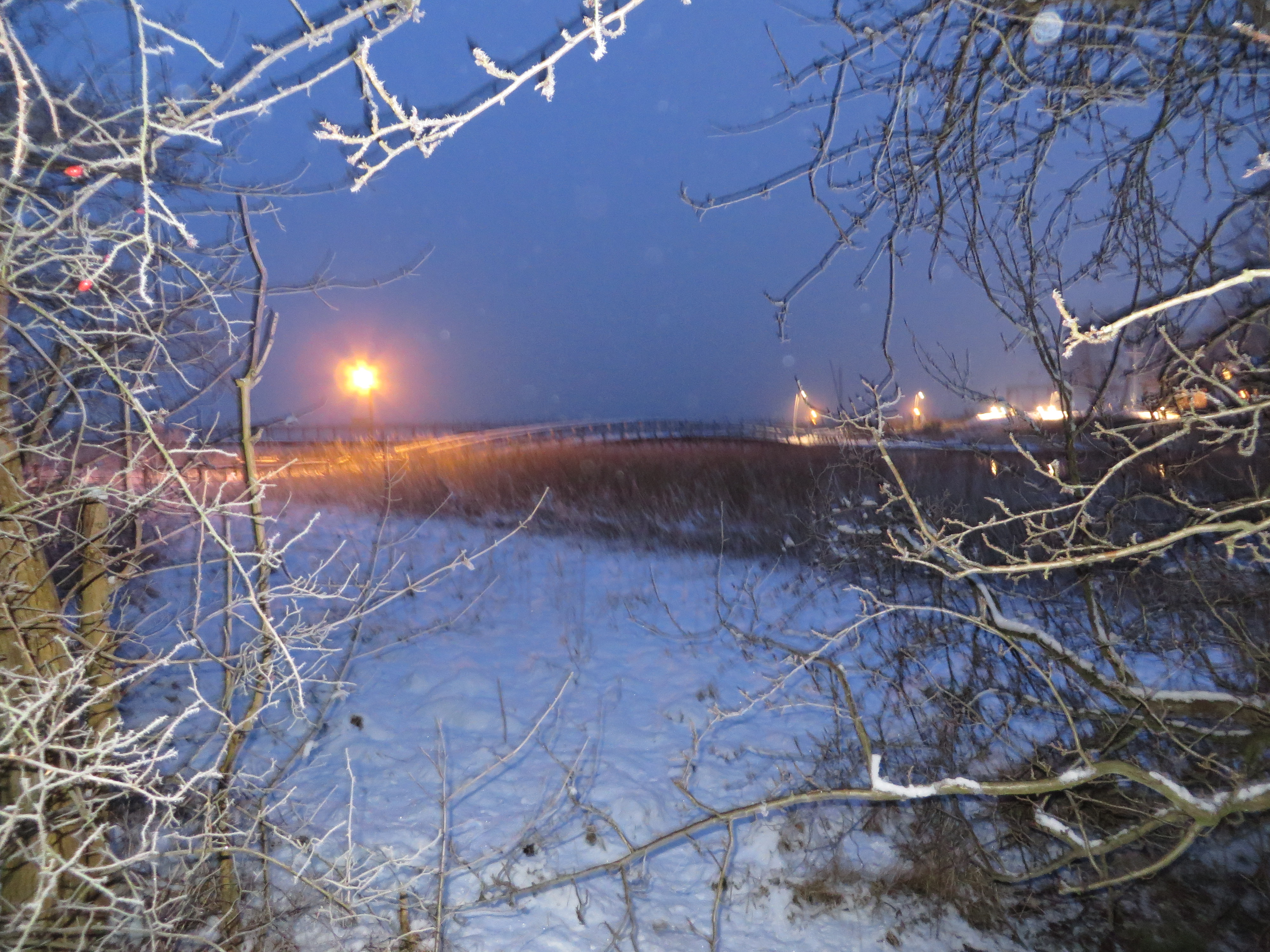 Fußgängerbrücke Quellental im Schnee zur Nacht (Glücksburg 31 Januar 2015), Bild 01